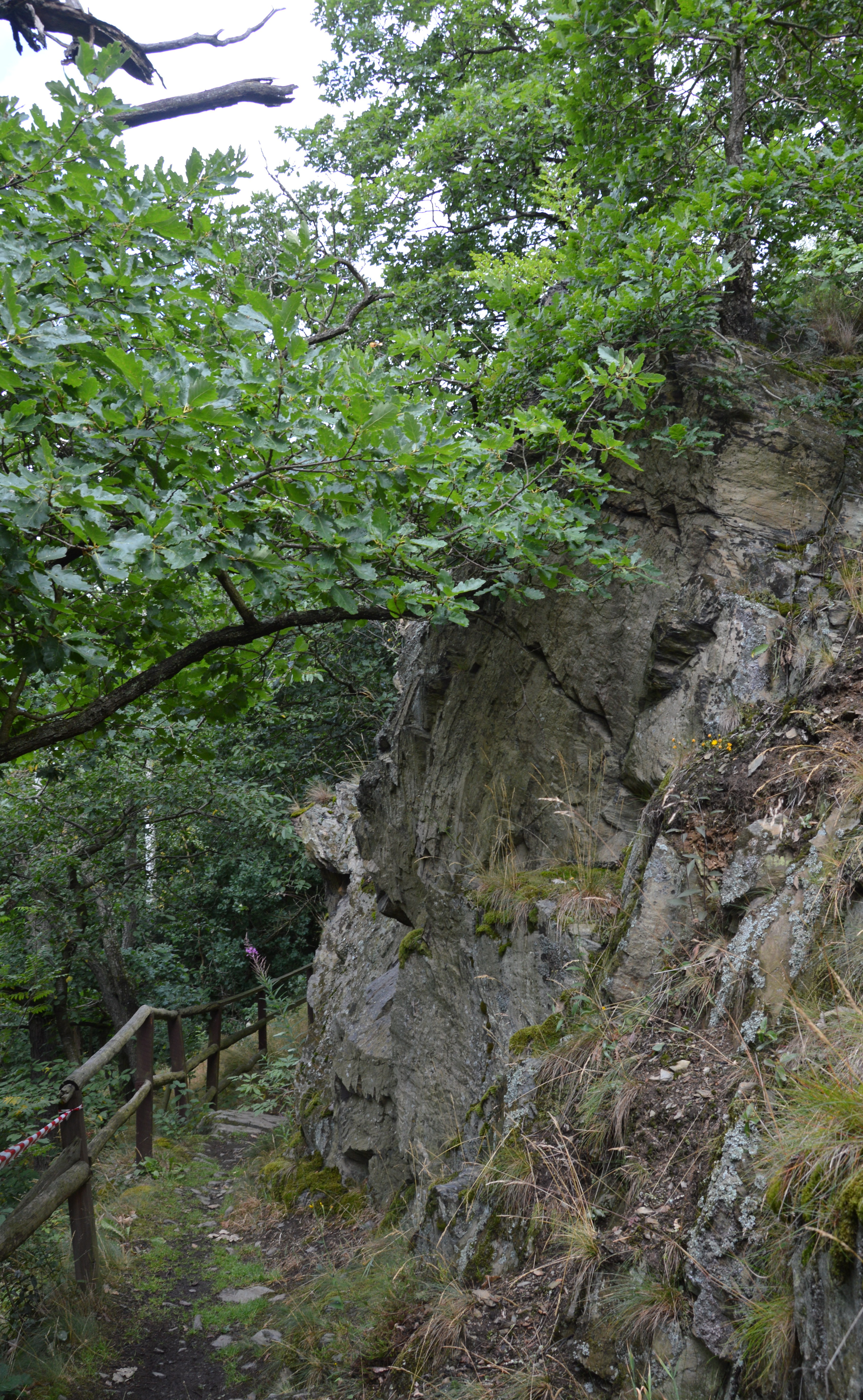 Teufelsklippe